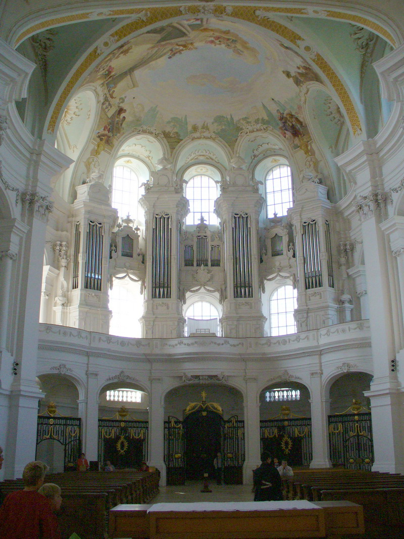 Neresheim Klosterkirche Orgel von Holzhay